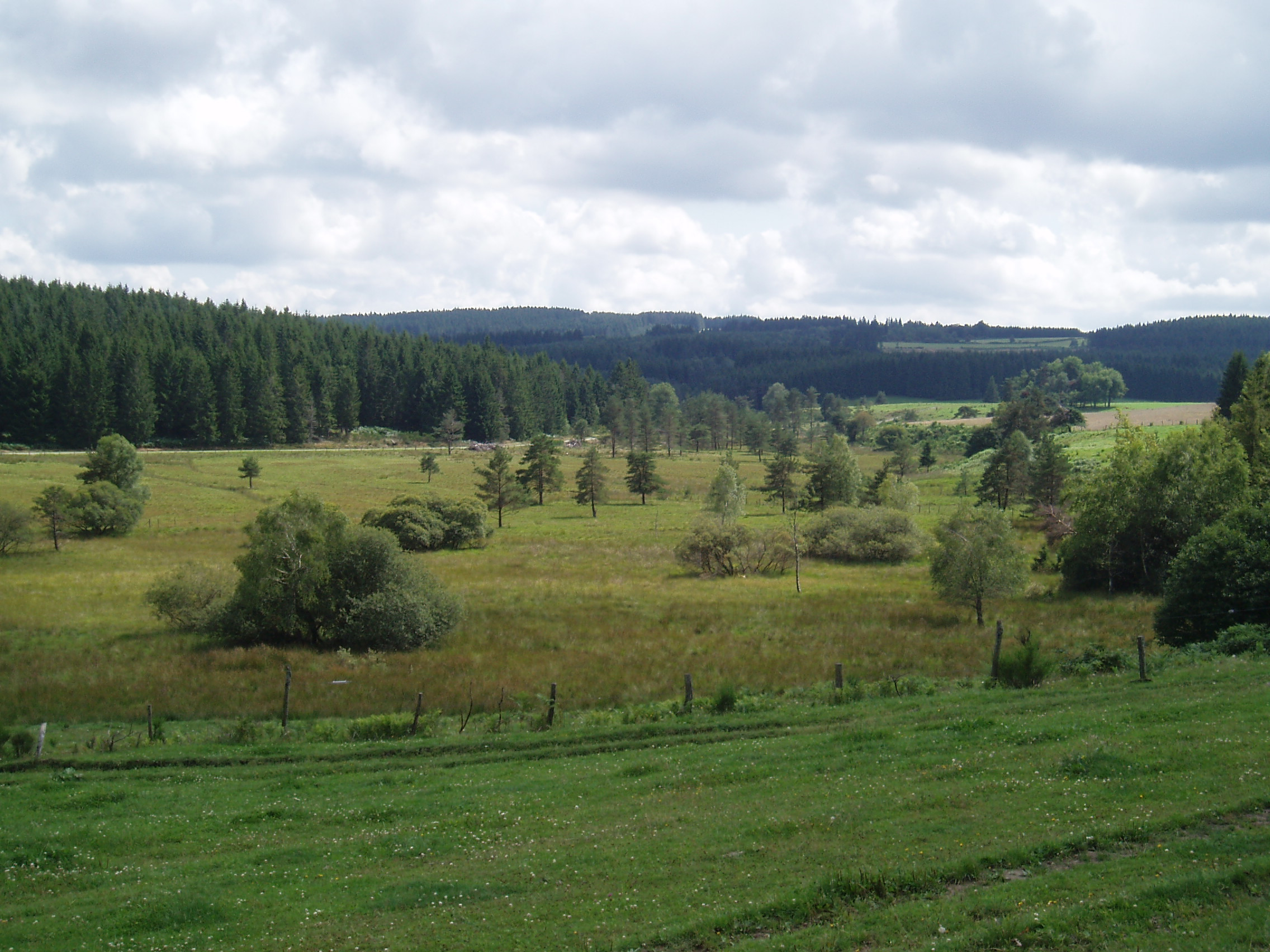 Prairies du plateau de Millevaches